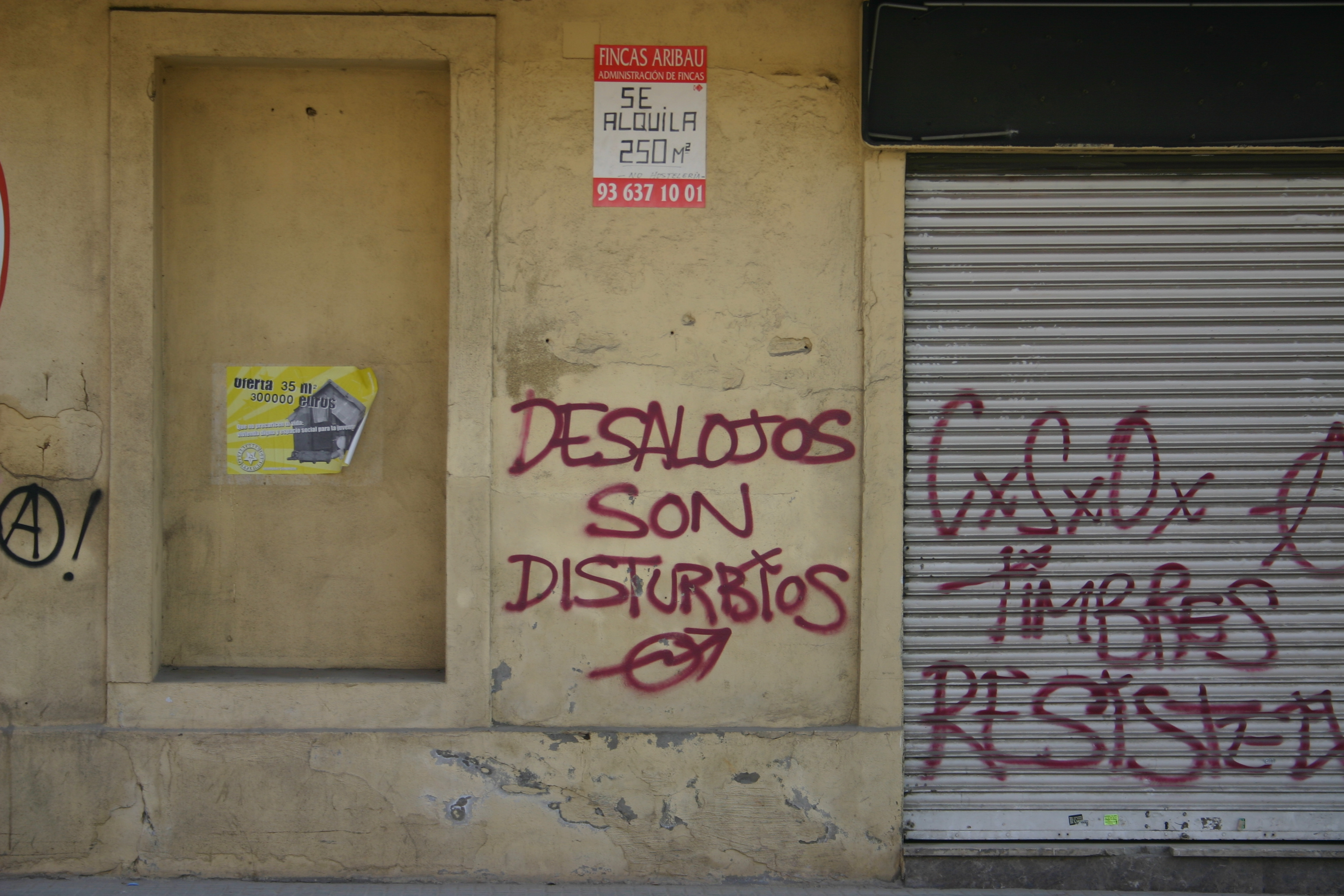 Pared junto a una casa ocupada, puede leerse "Desalojos son Disturbios" Casa okupada City: Viladecans Comments: En la pintada puede leerse "Desalojos son disturbios" By/Por: Yearofthedragon